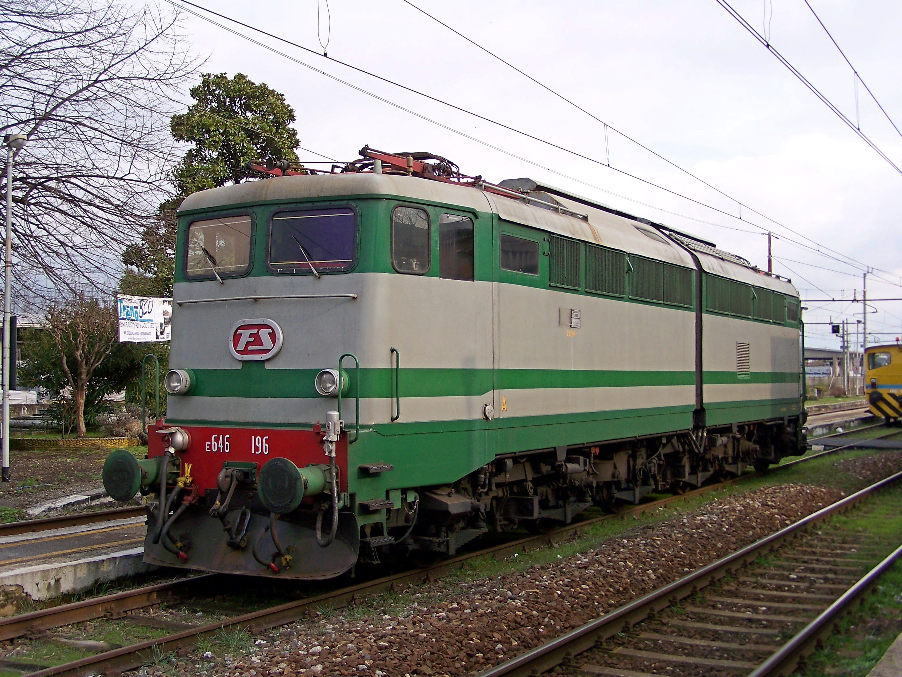 La E.646.196 in esposizione sul secondo binario della stazione di Palazzolo sull'Oglio per la Settima giornata delle Ferrovie Dimenticate